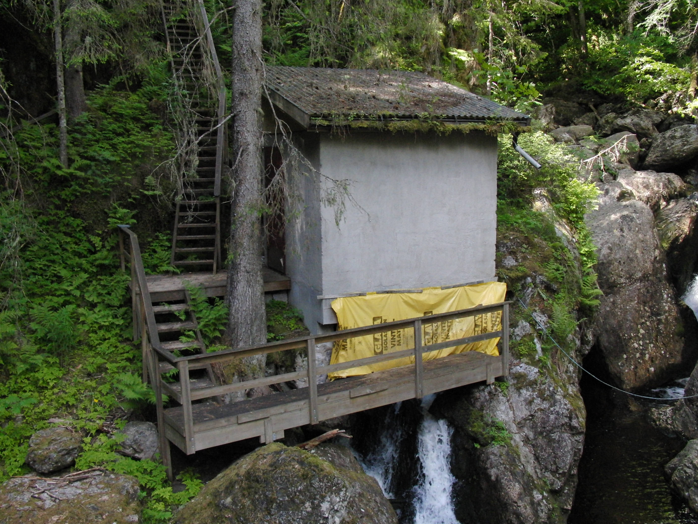 Tveiten kraftverk